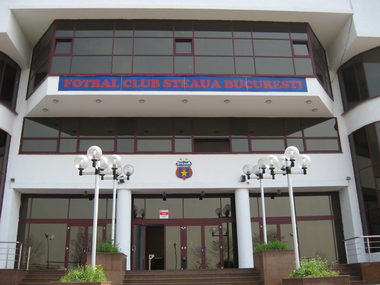 Entreada al Estadio Ghencea en Bucarest